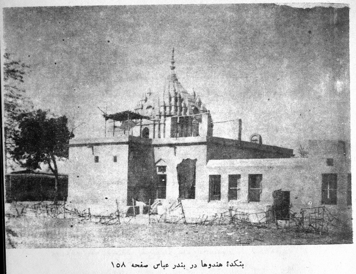 معبد هندوها بندرعباس در سال‌های پیش از 1342 خورشیدی